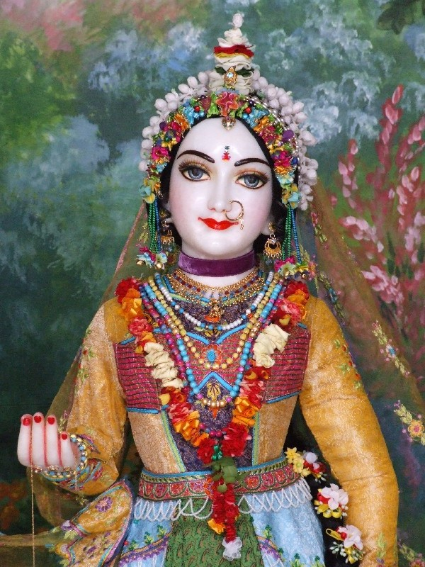 Radharani Hungary